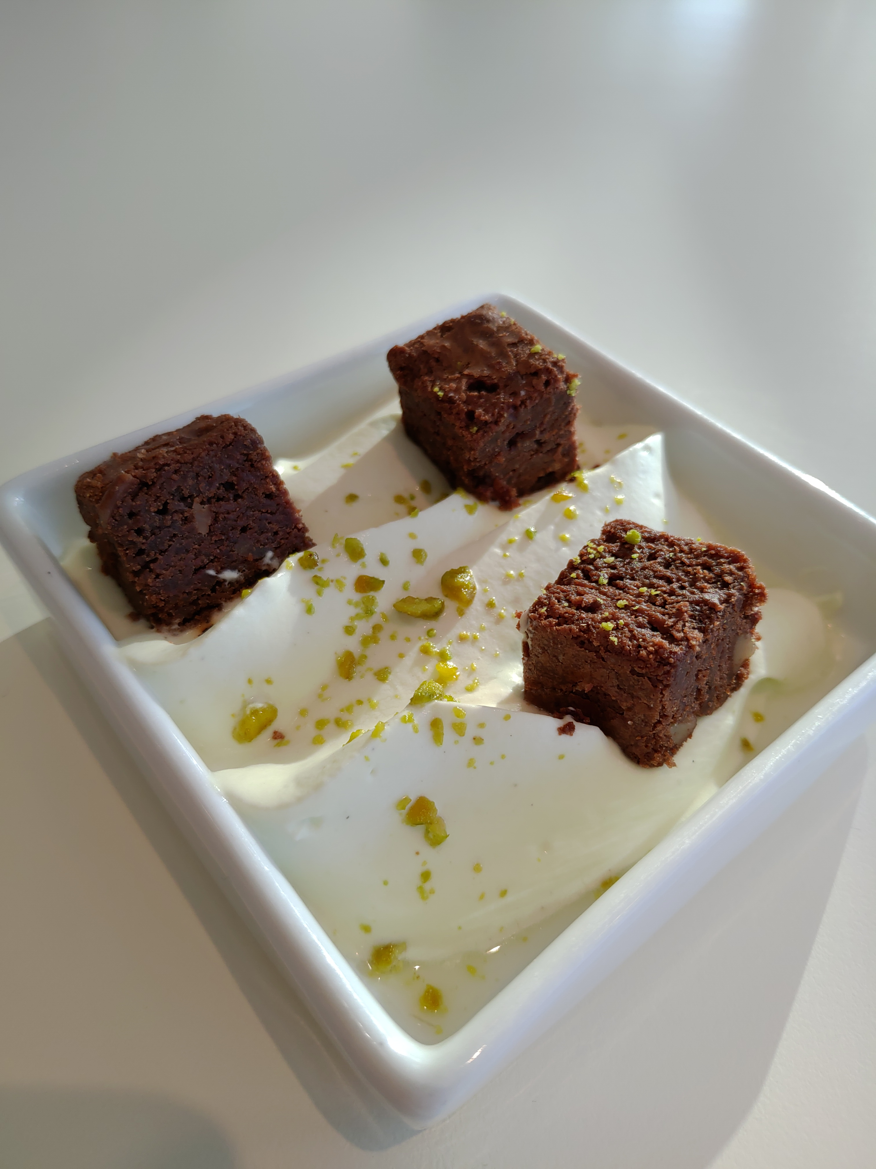 Fontainebleau accompagné de brownie et saupoudré d'eclats de pistaches